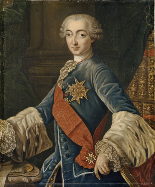 Ambassadeur en Suisse, en Pologne et à Venise, il porte l'ordre de Saint-Louis